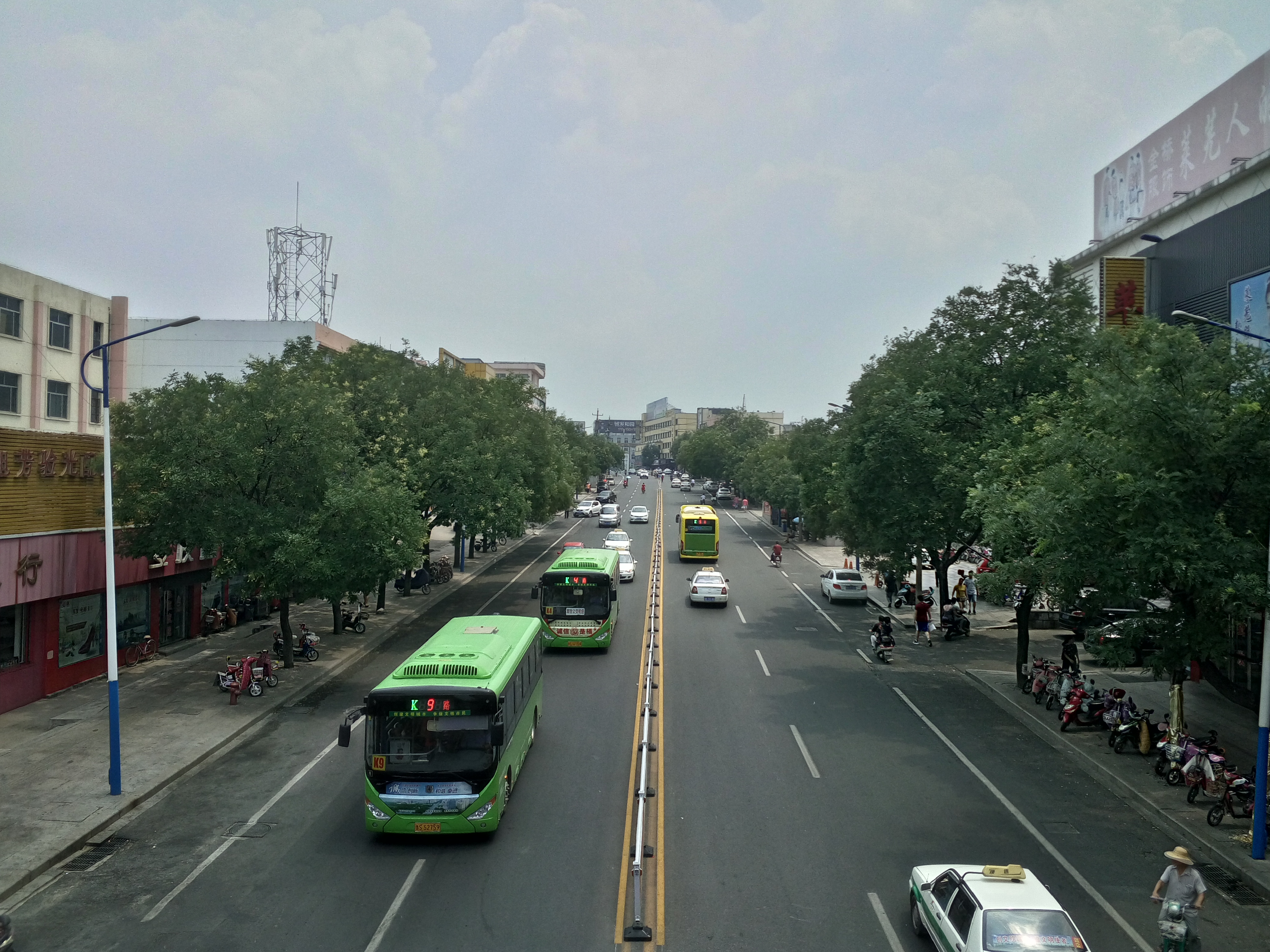 莱芜凤城西大街